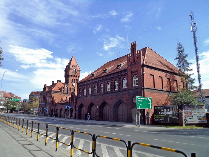 Gliwice, ul. Wrocławska 1 - zespół budynków Straży Pożarnej z przełomu XIX i XX w. (zabytek nr A/1375/88)